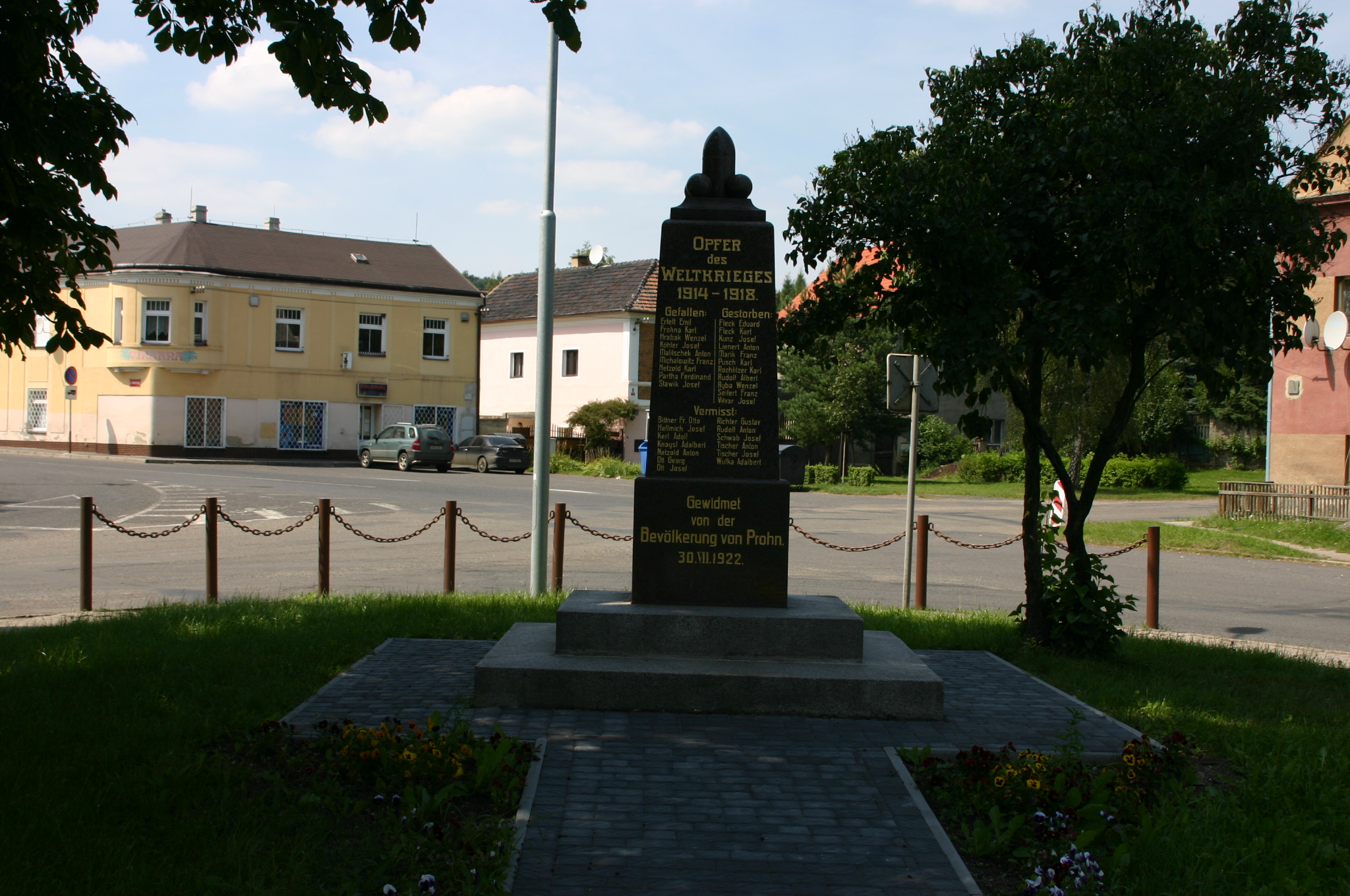 Pomník padlým v první světové válce v obci Braňany v okrese Most.